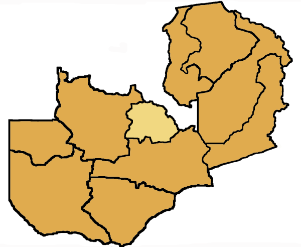 Mappa della diocesi di Ndola, in Zambia. Lavoro personale, eseguito a partire da questa immagine di Commons. Fonte per i confini: Guida delle missioni cattoliche 2005, a cura della Congregatio pro gentium evangelizatione, Roma, Urbaniana University Press, 2005. Categoria:Chiesa cattolica in Zambia Categoria:Mappe dell'Africa